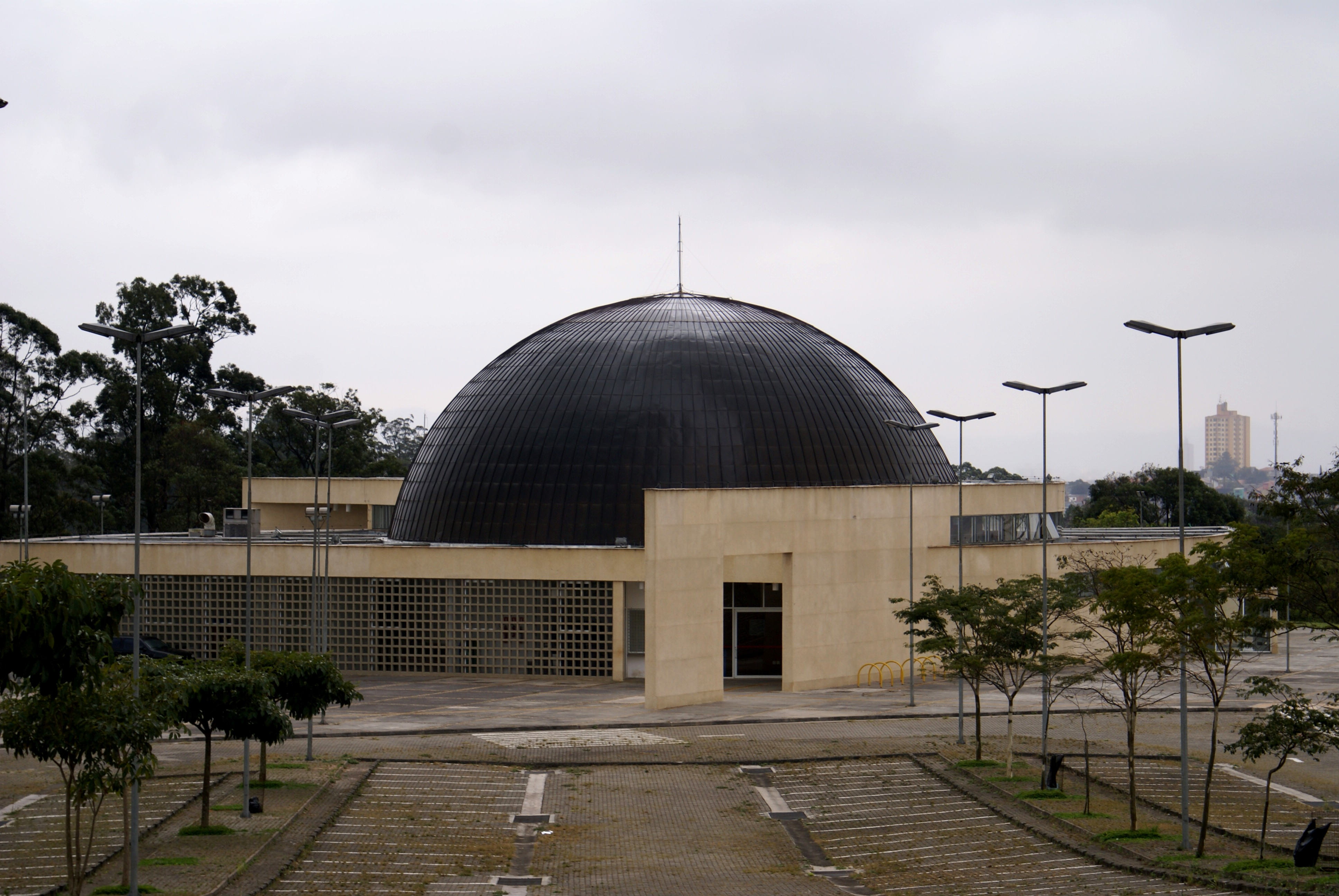 Carmo Planetarium in Carmo Park, São Paulo City, Brazil - Planetário do Carmo no Parque do Carmo, em São Paulo, Brasil.